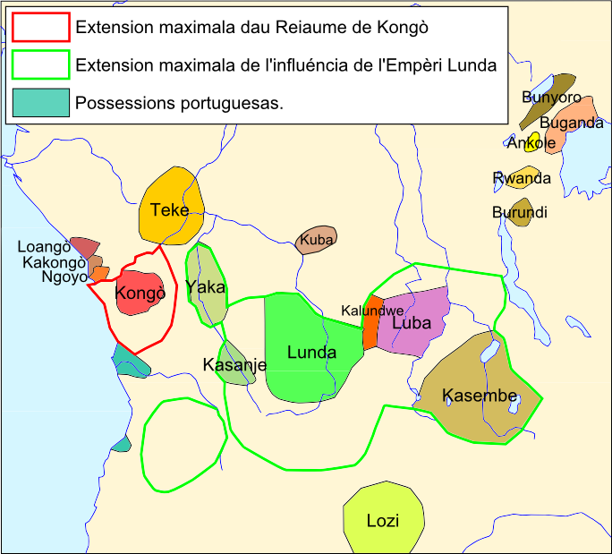 Bacin de Congò a la fin dau sègle XVIII.